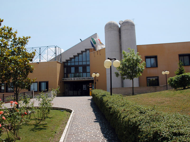 Unimol - Facoltà di Giurisprudenza